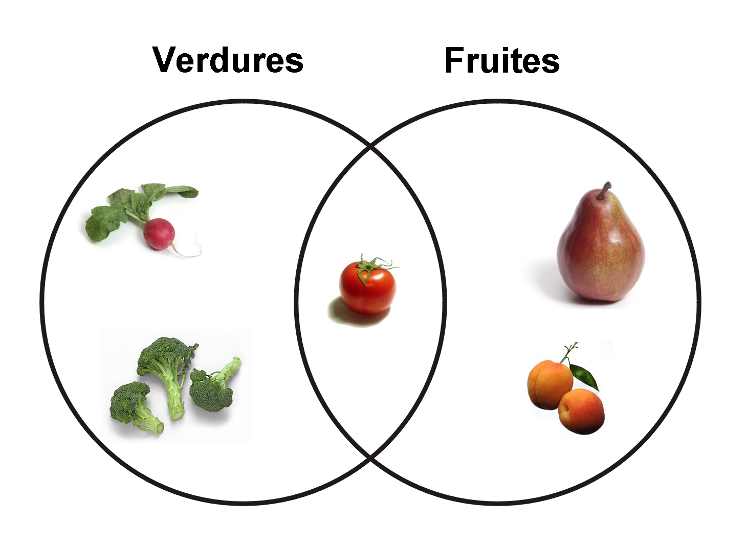 Diagrama de Murry que mostra la relació entre les fruites i eles verdures. Les fruites botàniques que no són verdures són fruites culinàries.